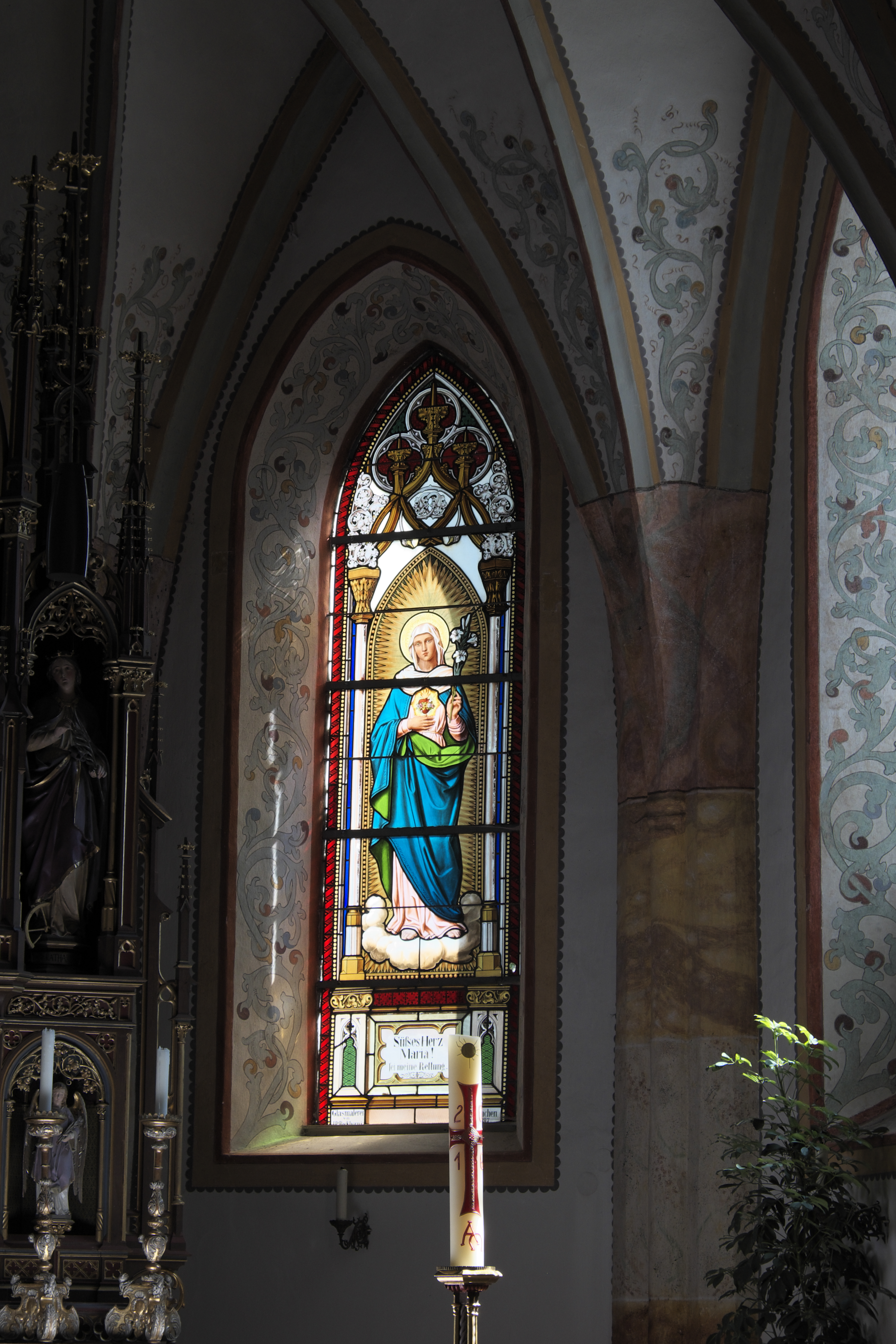 Katholische Pfarrkirche Mariä Geburt in Alling im Landkreis Fürstenfeldbruck (Bayern/Deutschland), Bleiglasfenster im Chor von Joseph Peter Bockhorni, von 1887; Darstellung: Unbeflecktes Herz Mariens